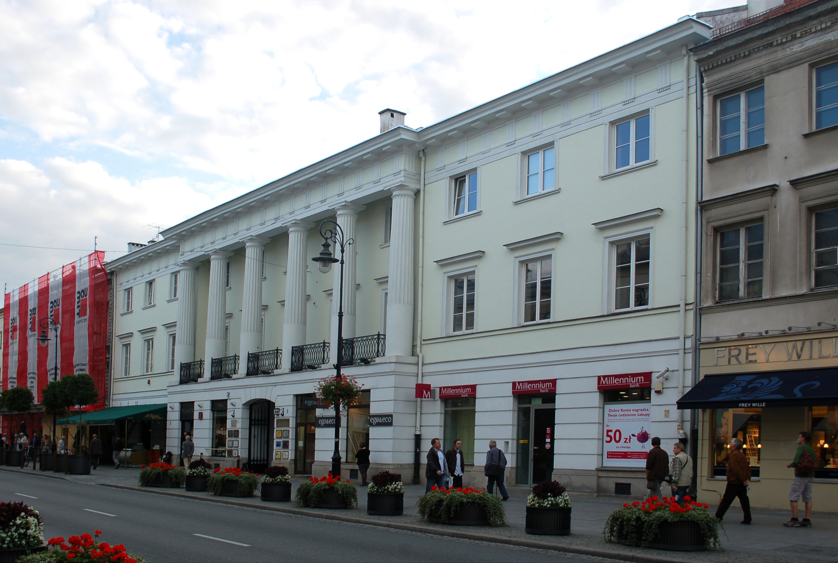 Warschau, Nowy Swiat 35, Hołowczyc-Palast